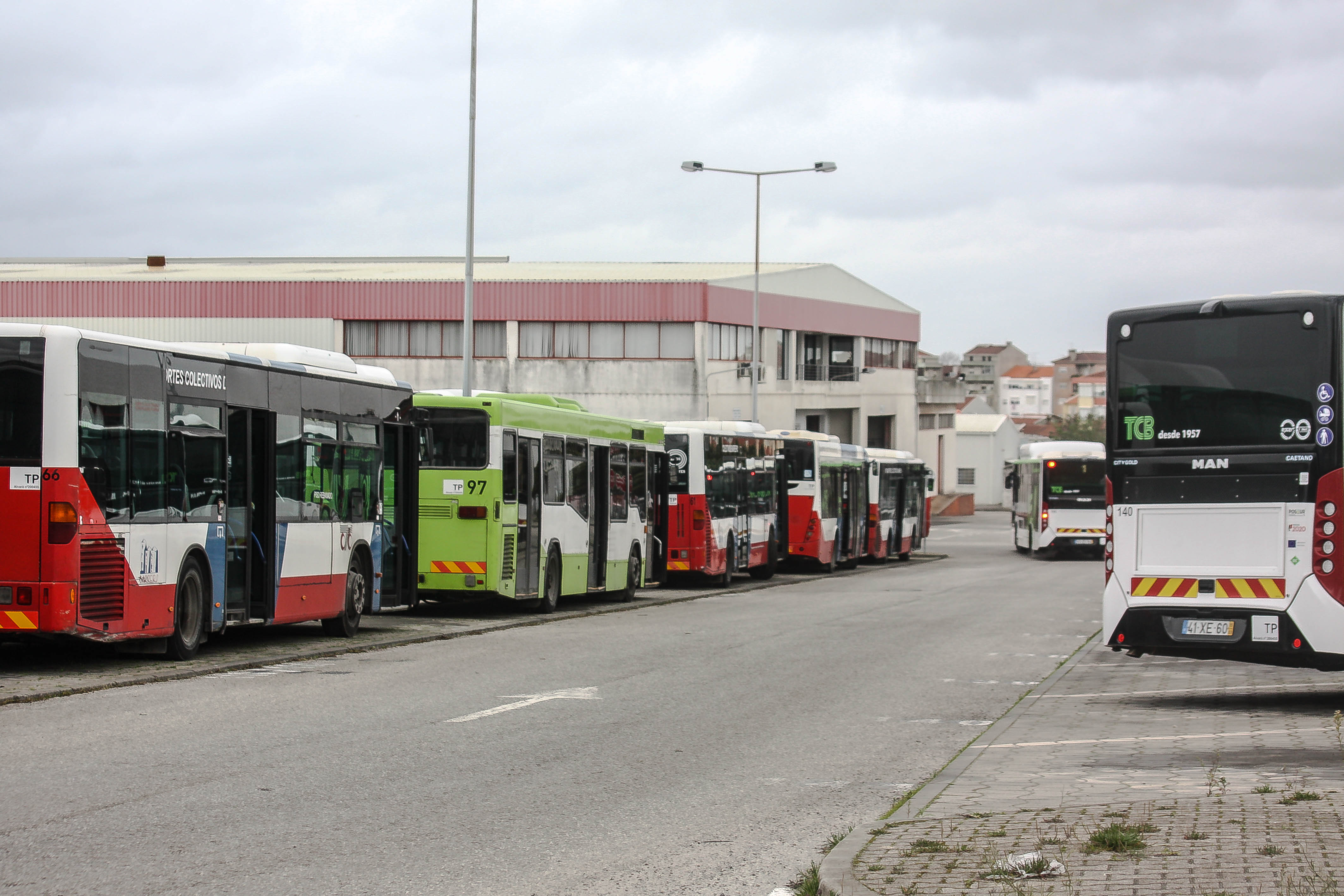 Autocarros dos TCB estacionados no parque da empresa.